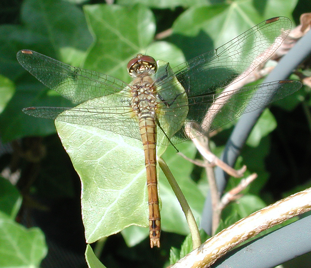 Sympetrum sanguineum, f., Blutrote Heidelibelle, Weibchen, Kirchwerder, Elbmarsch bei Hamburg, Deutschland